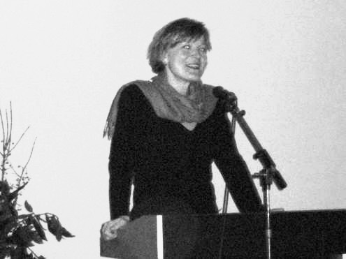 Monika Lüke, Generalsekretärin von Amnesty International in Deutschland, beim 40jährigen Jubiläum der Marburger Amnest-Gruppe